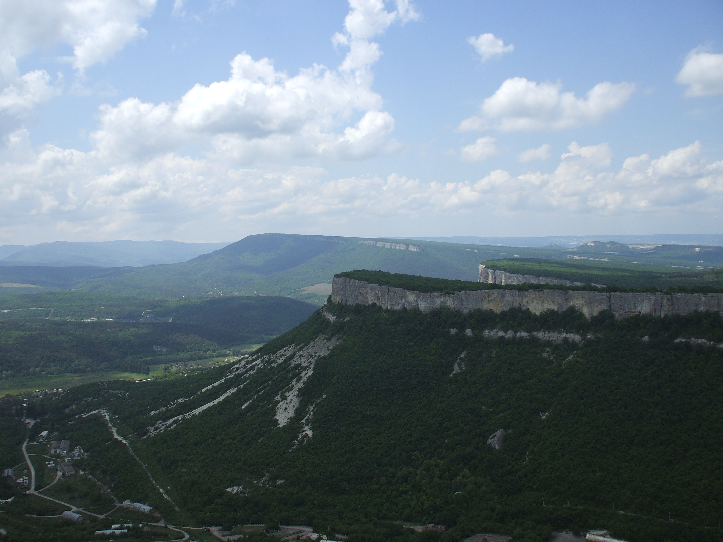 Киз-Кермен вигляд з Тепе-Кермен